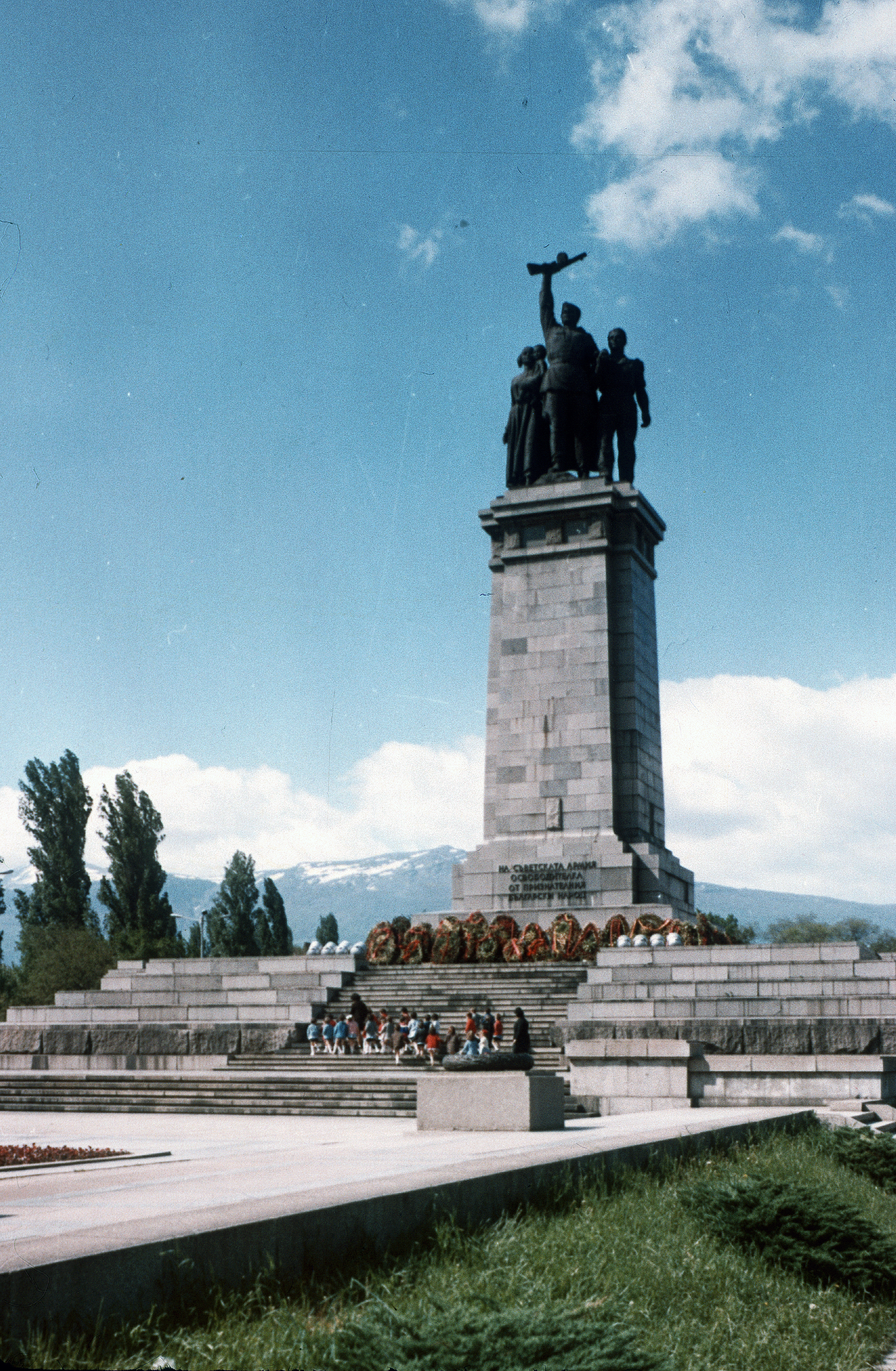 Bulgarien um 1970, Sofia, Denkmal der Sowjetarmee